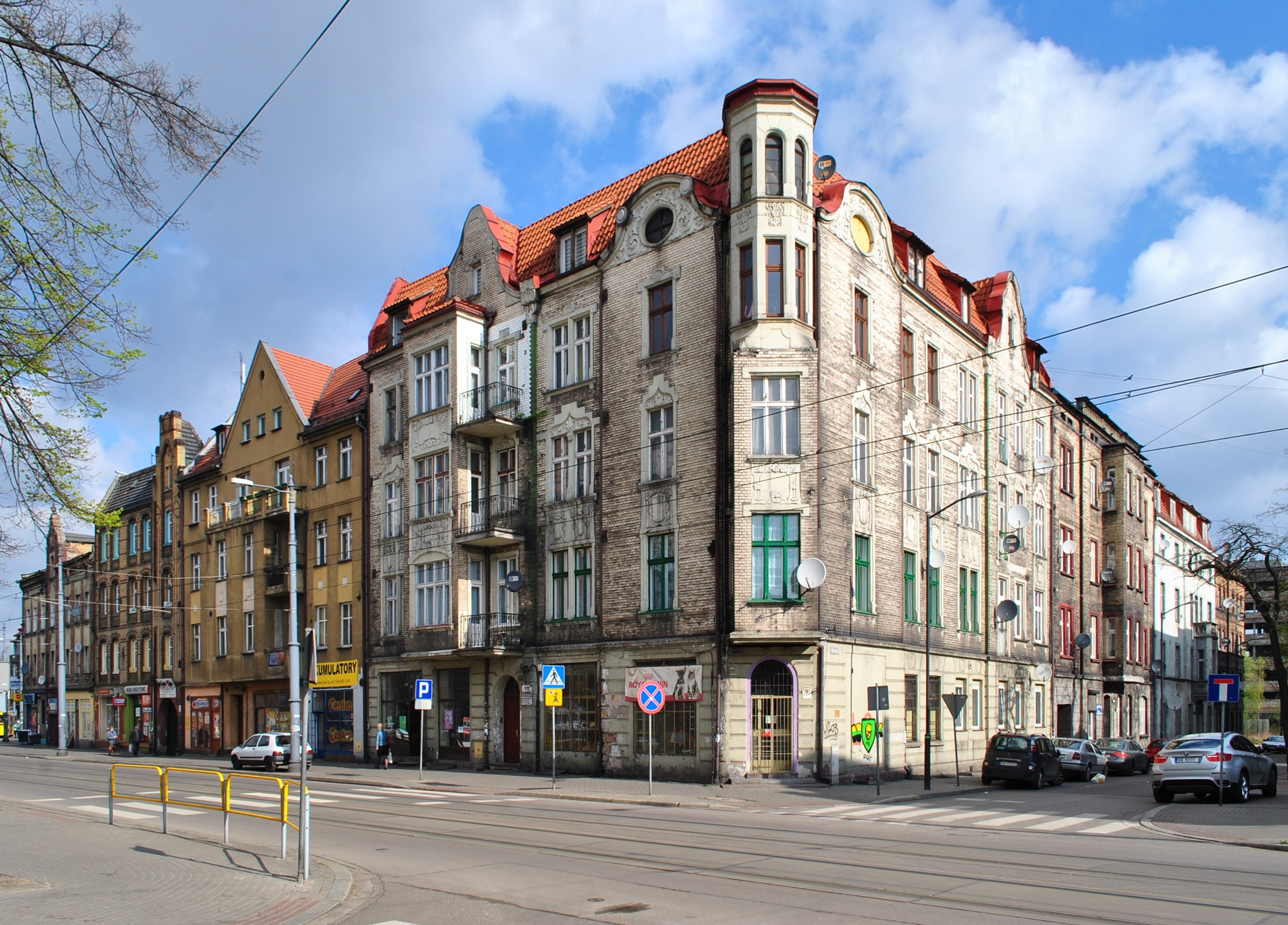 Katowice - Załęże. Kwartał kamienic na rogu ul. Gliwickiej i Marcina